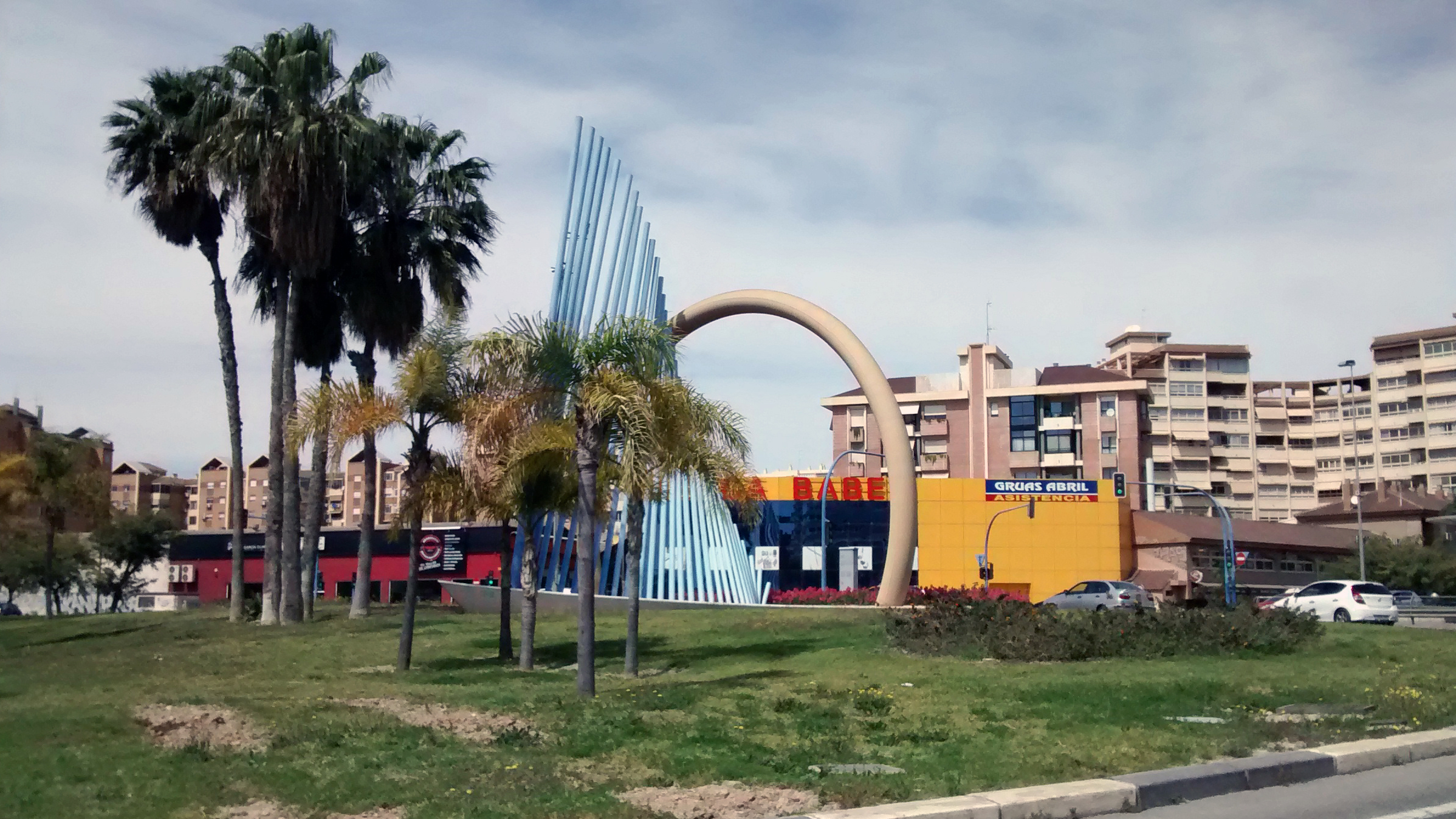 Rotonda del Barco (Alicante, España)